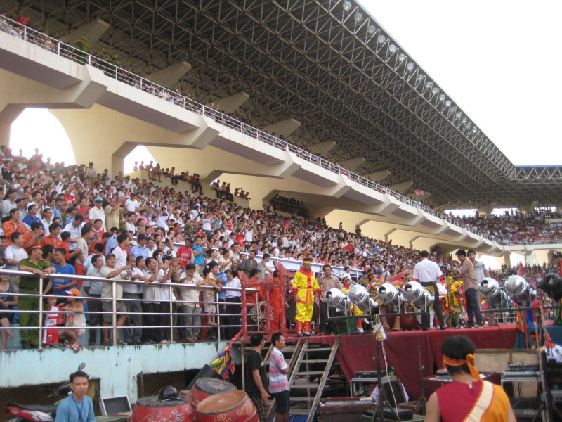 sân vận động Ninh Bình ngày Câu lạc bộ bóng đá Xi măng The Vissai Ninh Bình đăng quang vô địch